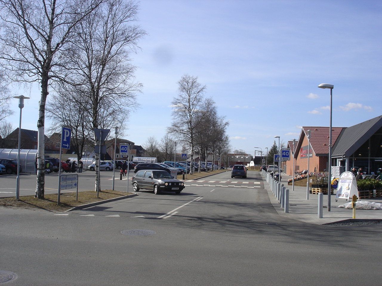 Sydbanegade i Vamdrup er anlagt på Vamdrupbanens tracé